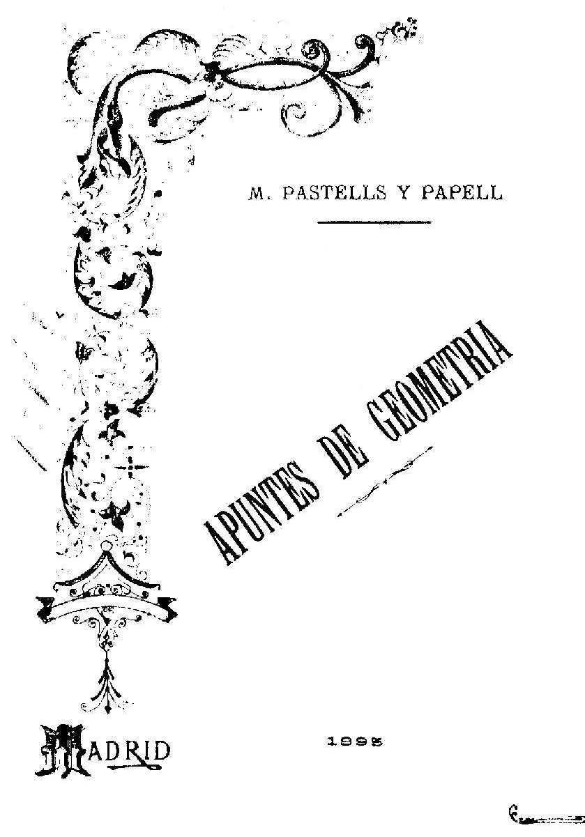 Portada del libro "Apuntes de geometría" de Martín Pastells y Papell. Publicado en Madrid, en 1895.